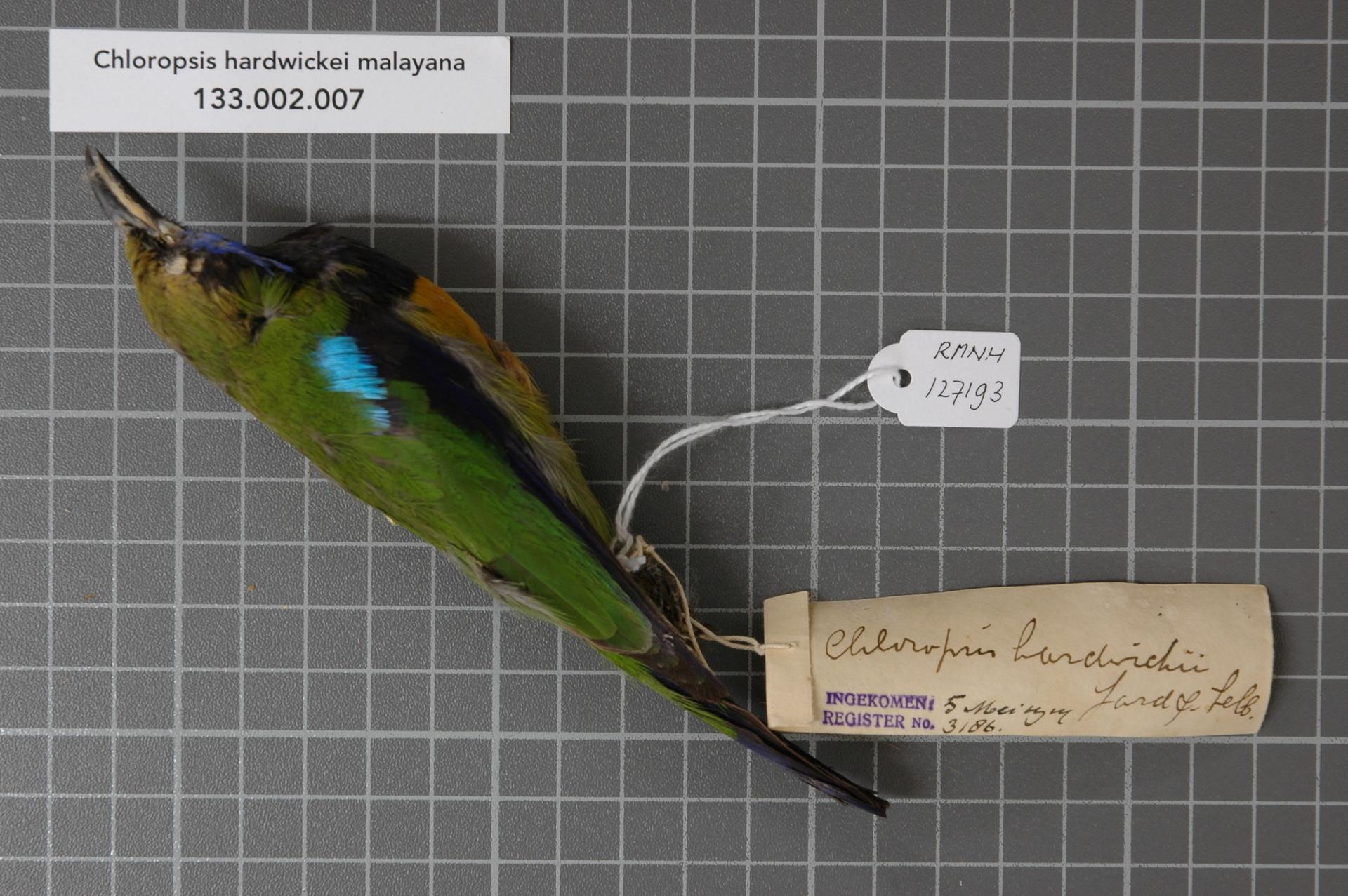 Chloropsis hardwickei malayana Robinson & Kloss, 1923